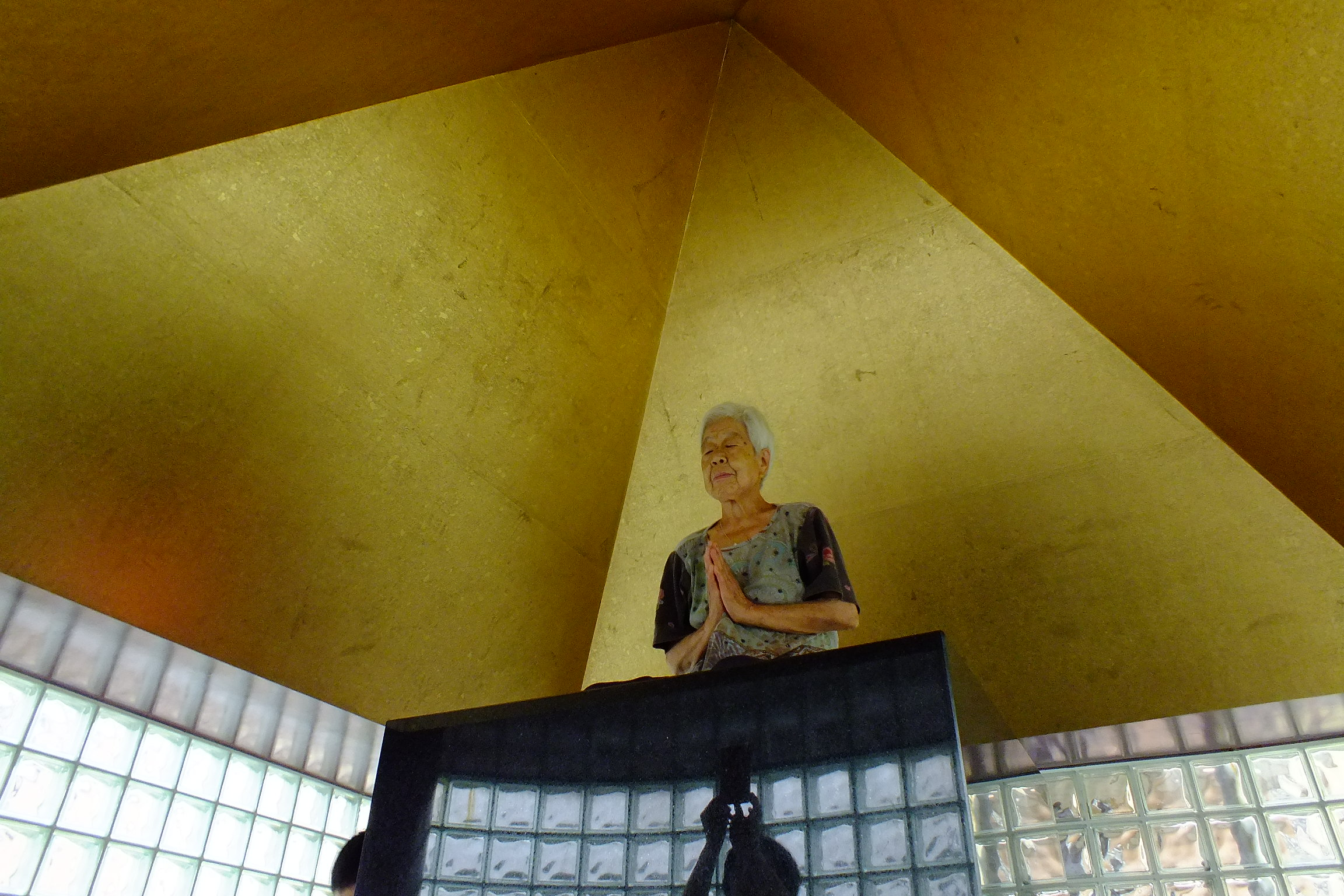 2015-09-06 Okanoyama museum-岡之山美術館